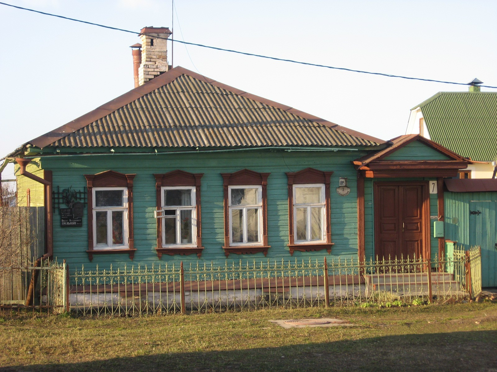 Дом Пильняка в Коломне на улице Арбатская, в настоящее время дом принадлежит семье Жраковых